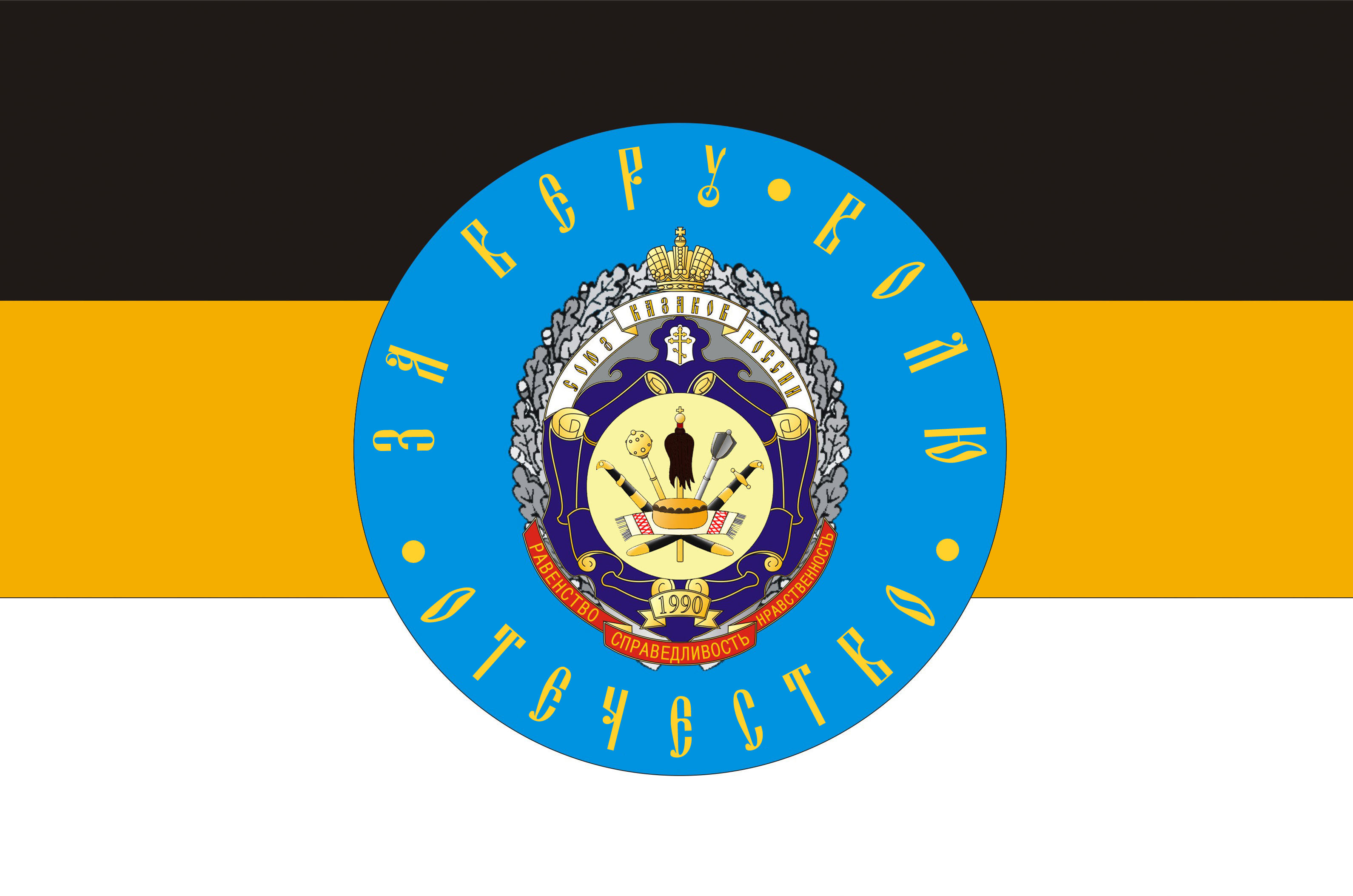 Лицевая сторона знамени и флаг Общероссийской общественной организации Союз казаков России